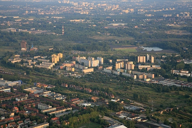 Bytom z lotu ptaka - Szombierki.